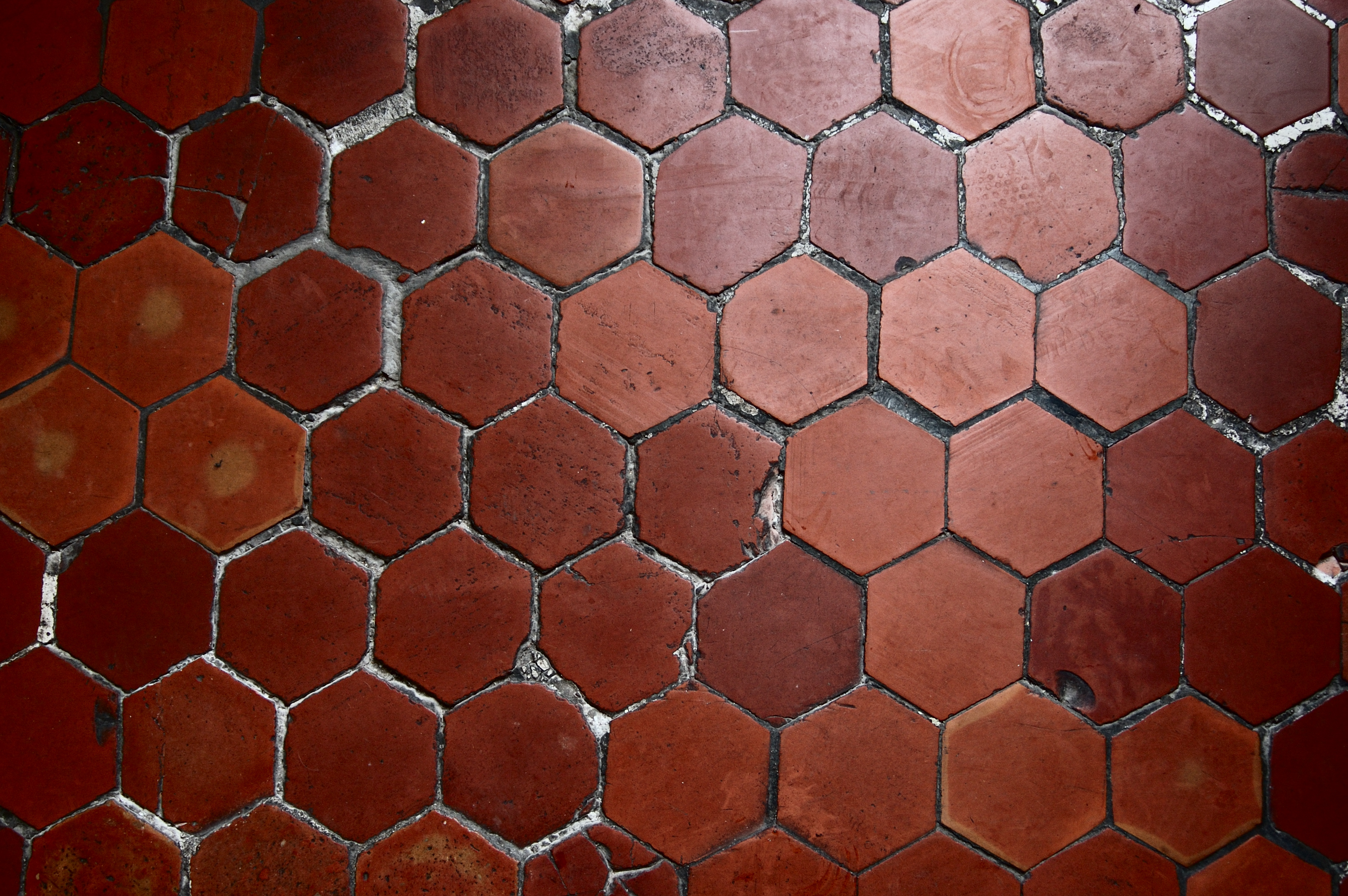 Tomettes de la mairie d'Aix-en-Provence (France)